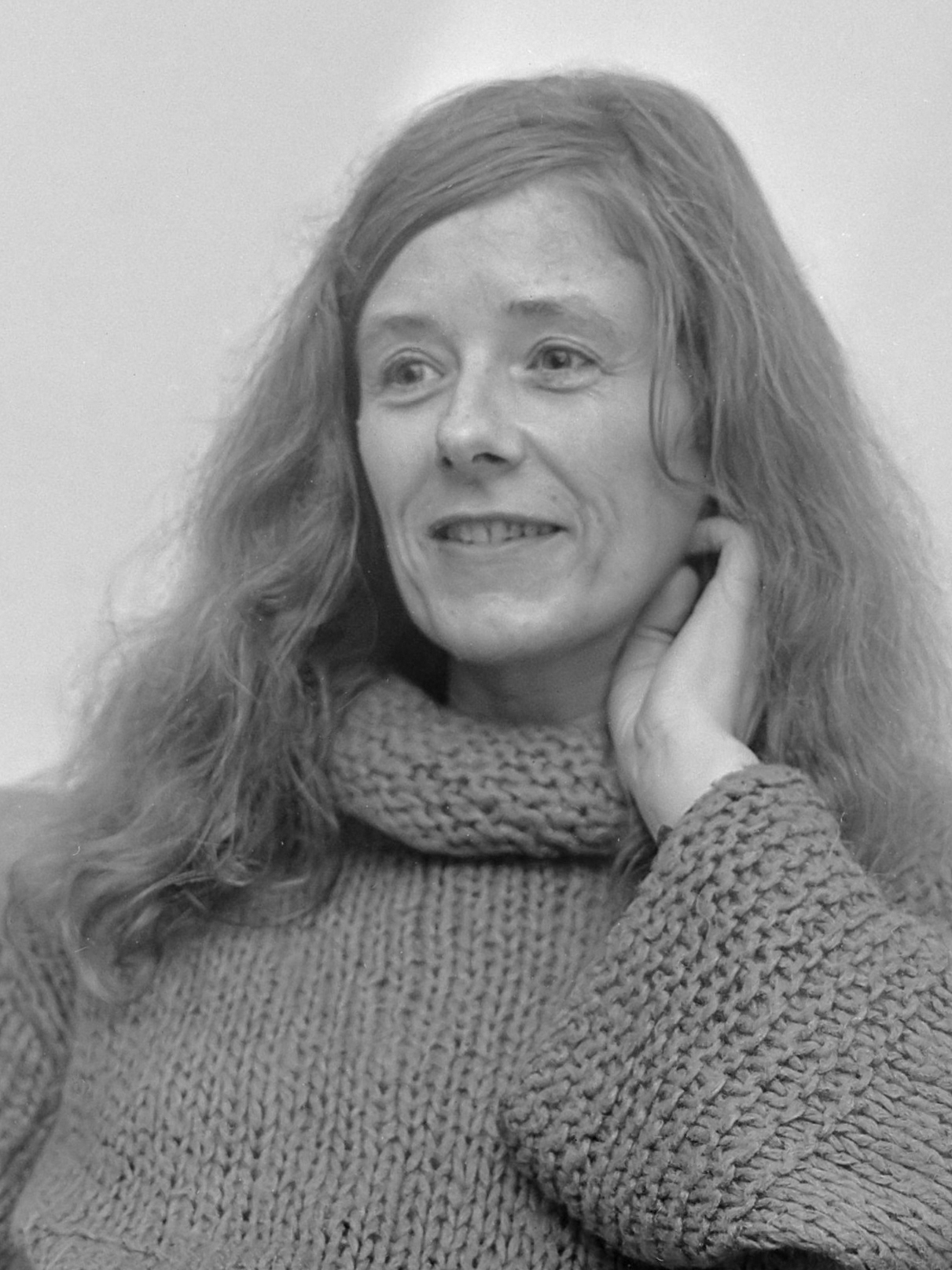 Joke Kool Smit (kop), opdracht GPD 11 oktober 1978